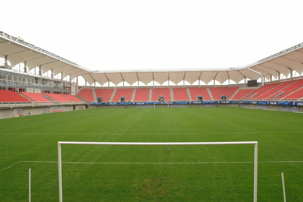 Estadio Nelson Oyarzún, Chillán, Chile